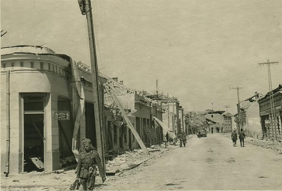 Fotografije Smedereva neposredno pre i nakon katastrofalne eksplozije juna 1941. u kojoj je poginulo više hiljada ljudi u jednom danu - Ulica u centru Smedereva nakon eksplozije. Da bi se shvatile razmere uništenja, treba napomenuti da grad prethodno nije pretpreo bilo kakvu ratnu štetu u aprilu 1941. Sva oštecenja koja se vide nastala su u trenu eksplozije. Ove kuće su bile udaljene oko pola kilometra od centra eksplozije